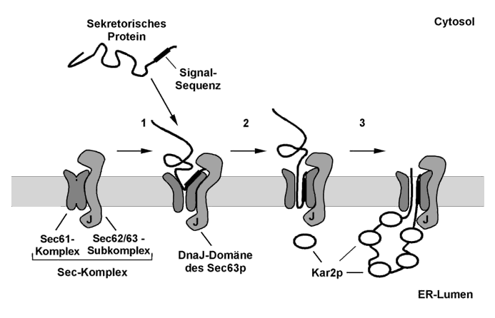 Schema post-translationaler Transport durchs ER